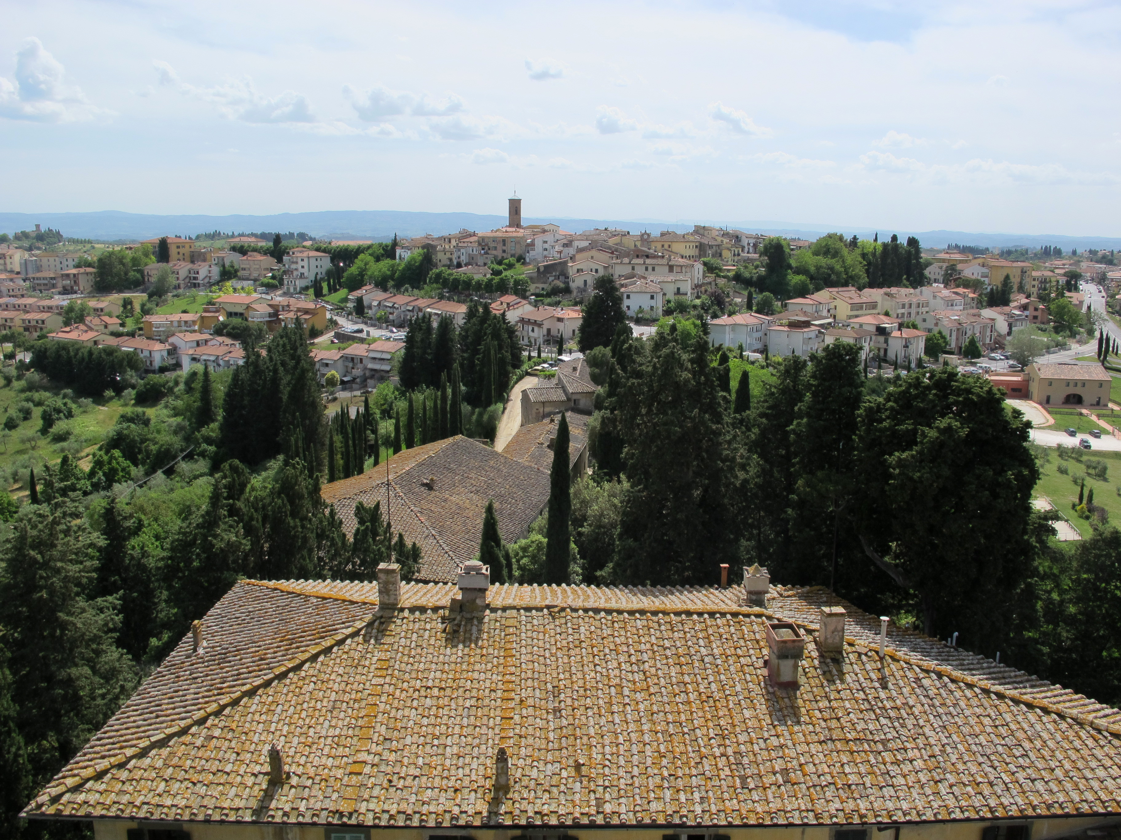 Castello di Sidney Sonnino (Montespertoli)